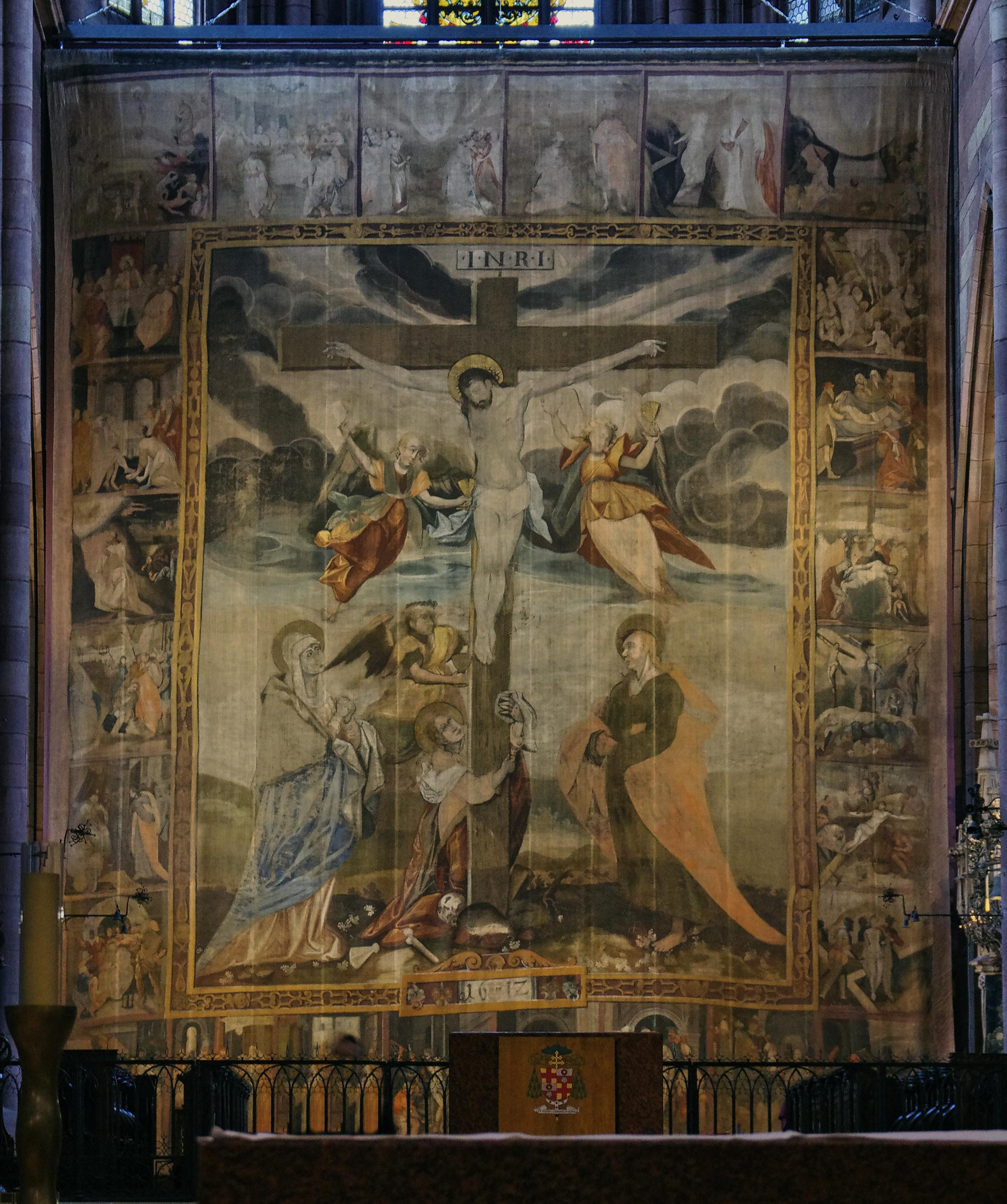 Das Fastentuch im Freiburger Münster